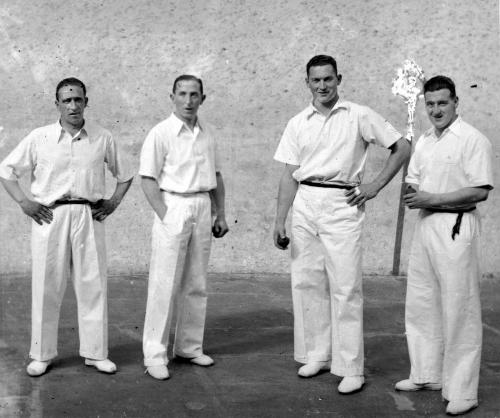 The pelotaris Chiquito de Mallavia (Pablo Berasaluce), Chiquito de Iraeta (Francisco Larrañaga), Miguel Gallastegui and Felipe (José Aramendi) at the Frontón Astelena in Eibar